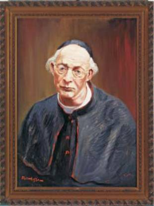 Franz Schmid, Kapitularvikar Bistum Brixen